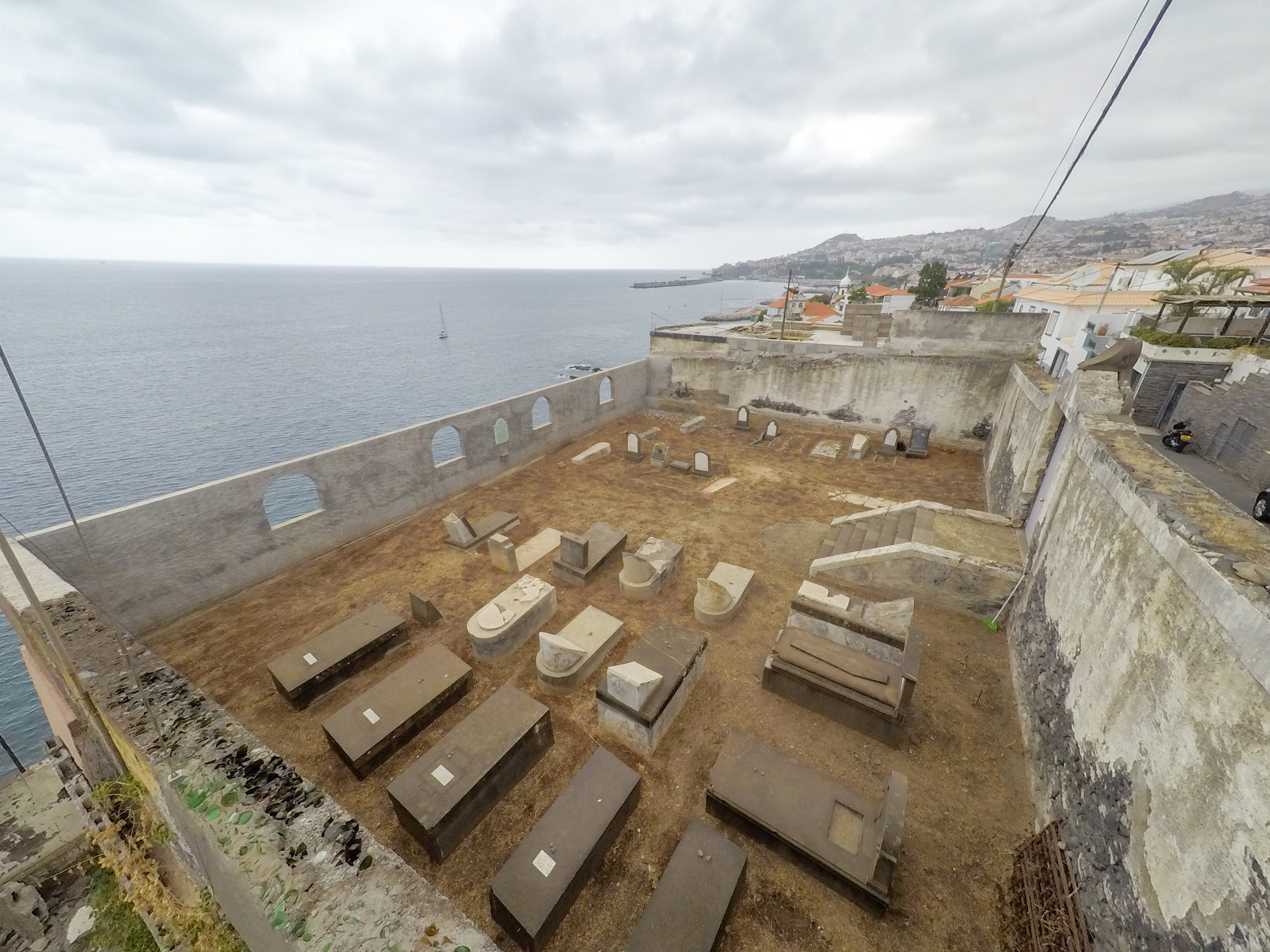 Cemitério Judaico do Funchal - cemitério no Funchal, Portugal Cultural property Jewish Cemetery of Funchal, Santa Maria Maior, Funchal, Madeira, Portugal Q22248352, SIPA ID: 8317 Wiki Loves Monuments ID: DRC-M-220304027